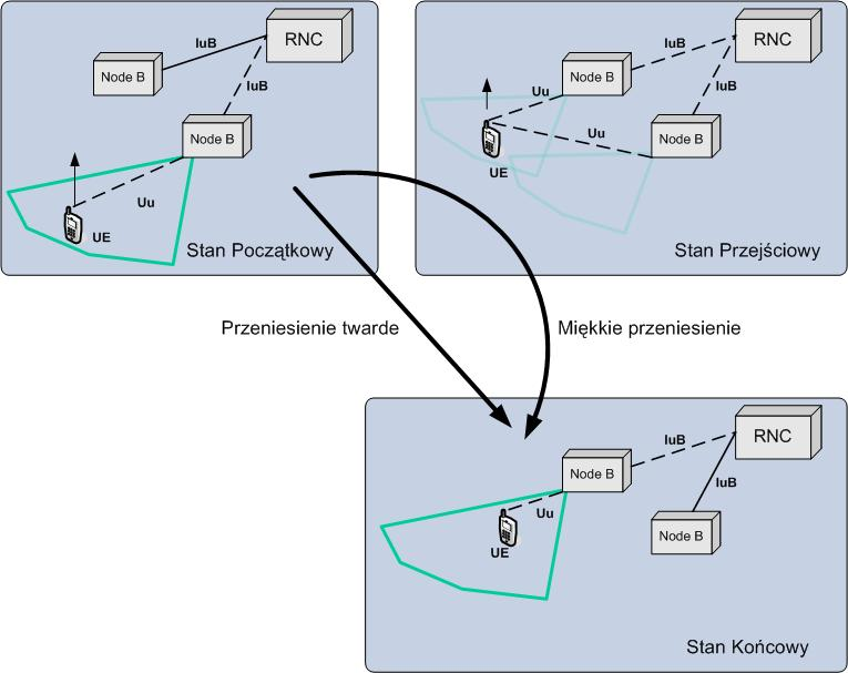 Ilustracja przedstawia mechanizm miękkiego oraz twardego przenoszenia połączeń, w sieci UMTS.